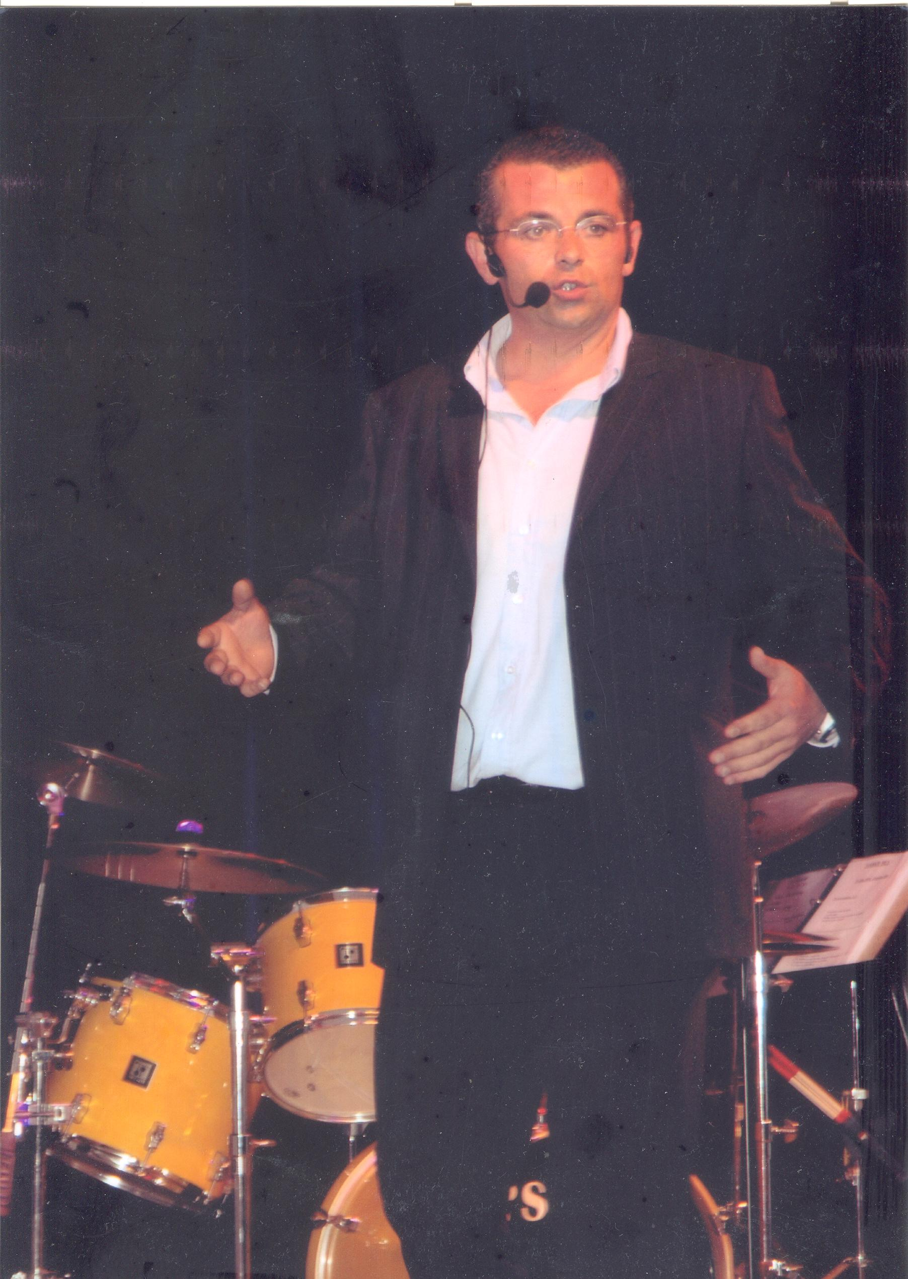 Eric Collado dans son spectacle "Kantuveu Tupeu"